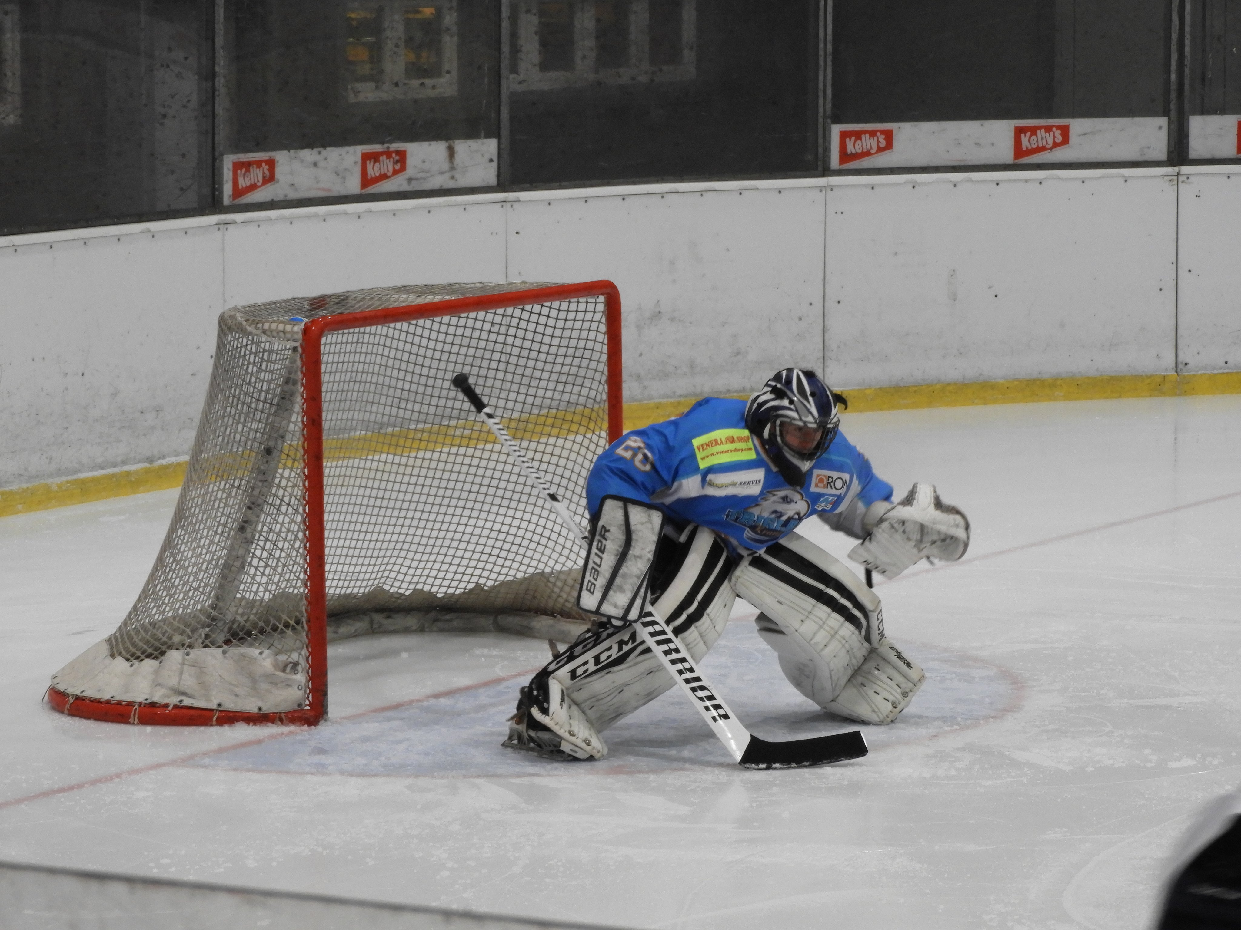 Hokejski klub Triglav Kranj, Uroš Plavc vratar, Člani 2017 Slovenija